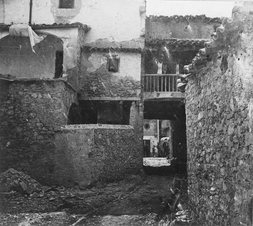 Carrer cobert d'entrada a la plaça de Gombrèn. Cèsar August Torras i Ferreri (Entre 1890 i 1923)